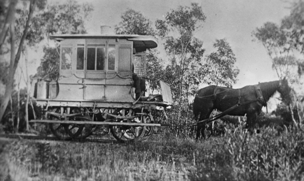 South Australian Railways - Port Broughton to Mundoora 3 ft 6 in gauge tramway. It was a horse-worked 10 mile long line which opened in 1876 and lost its passenger service in 1924.